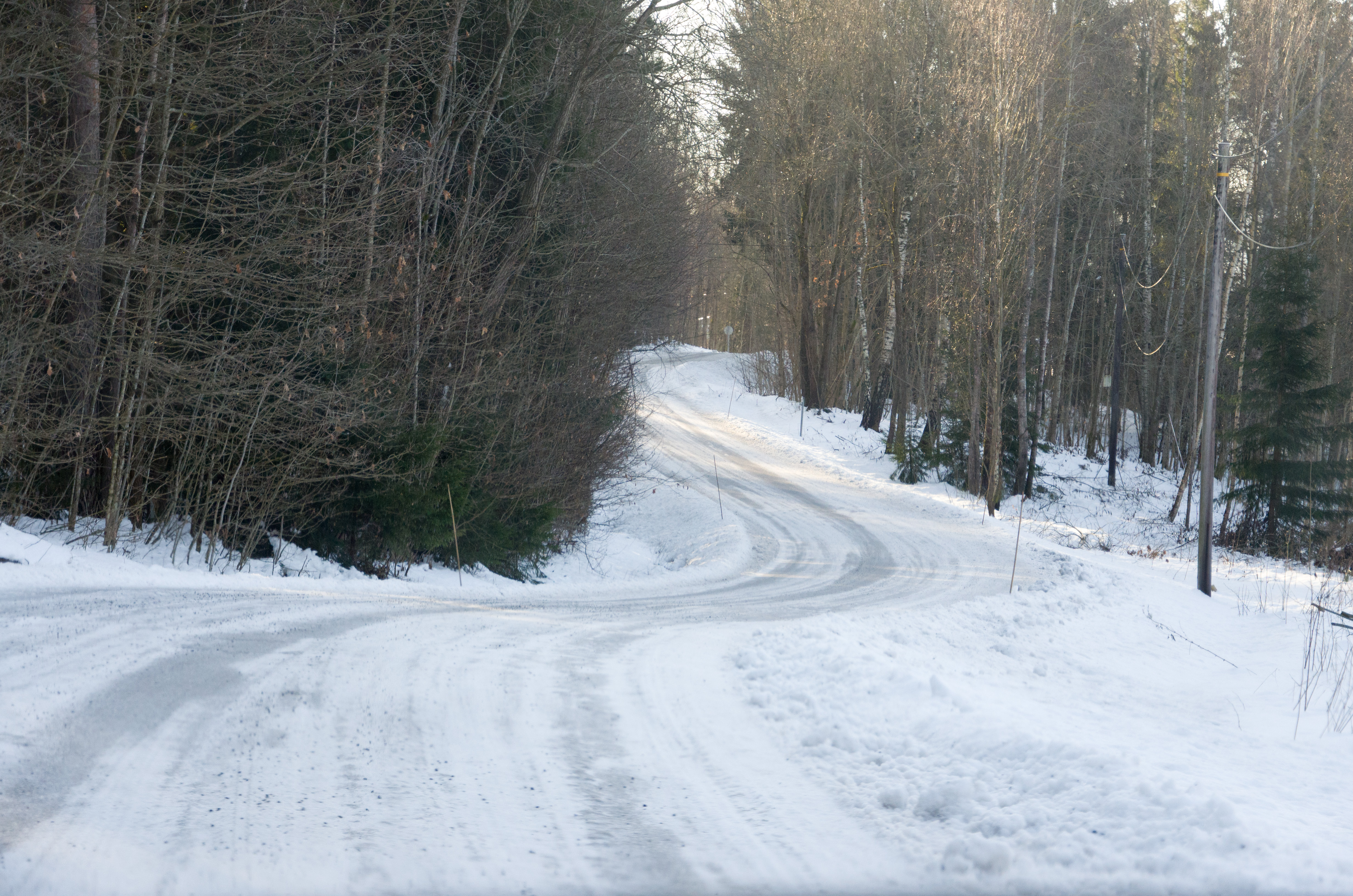 Fylkesvei 945 Østbygdaveien i Vestfold